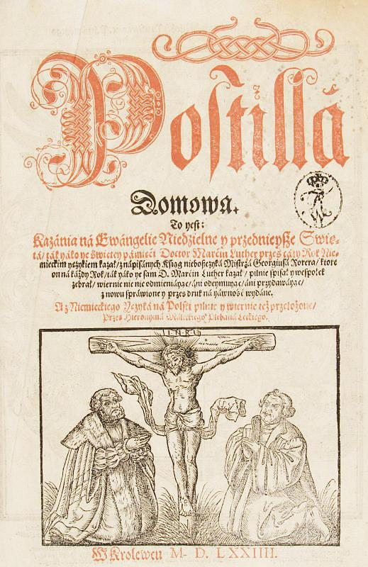 Аркуш Хронікі польскай, літоўскай, жамойцкай і ўсяе Русі